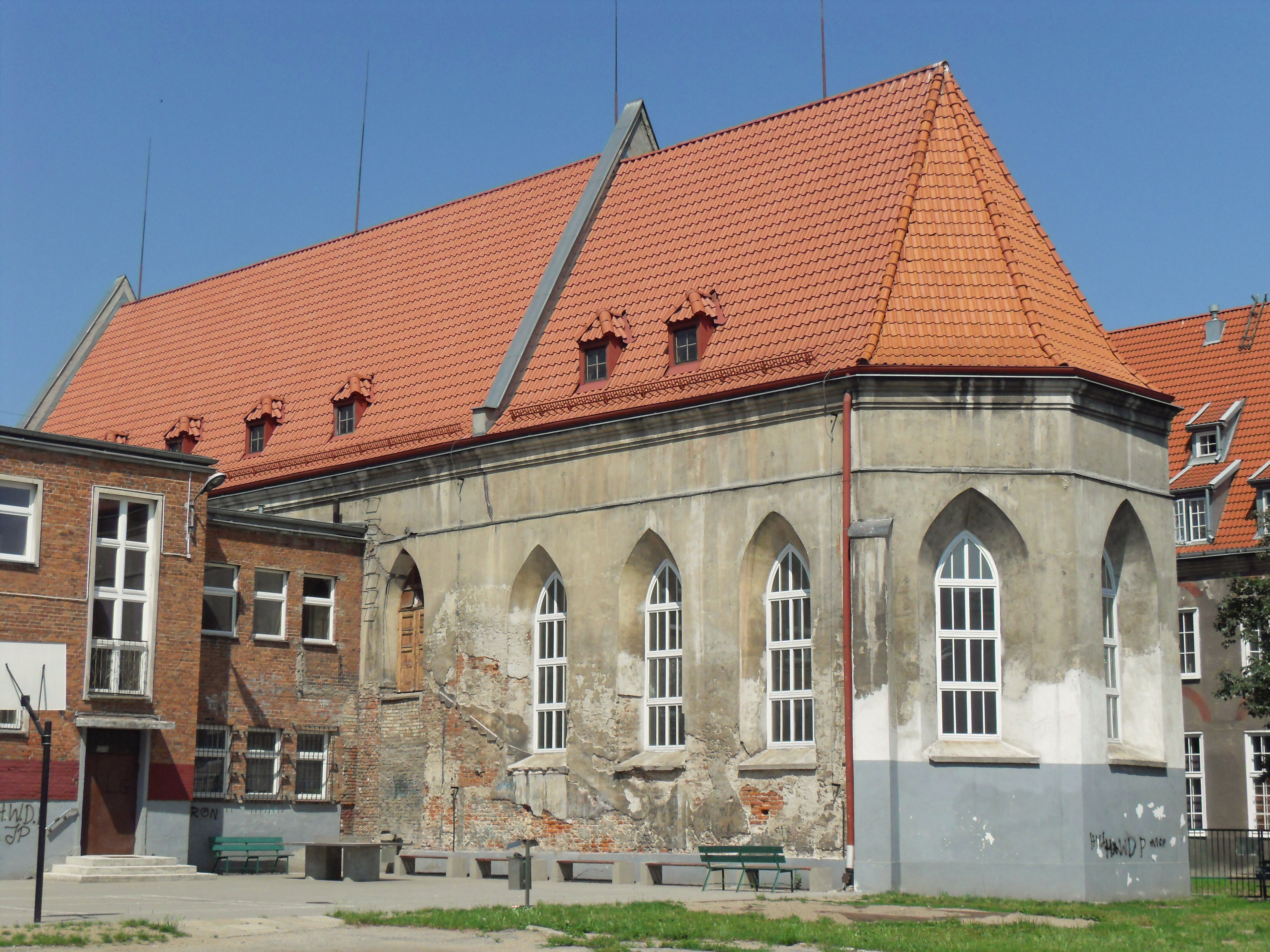 Gdańsk Główne Miasto. Dawny kościół św. Ducha w Gdańsku - tył.